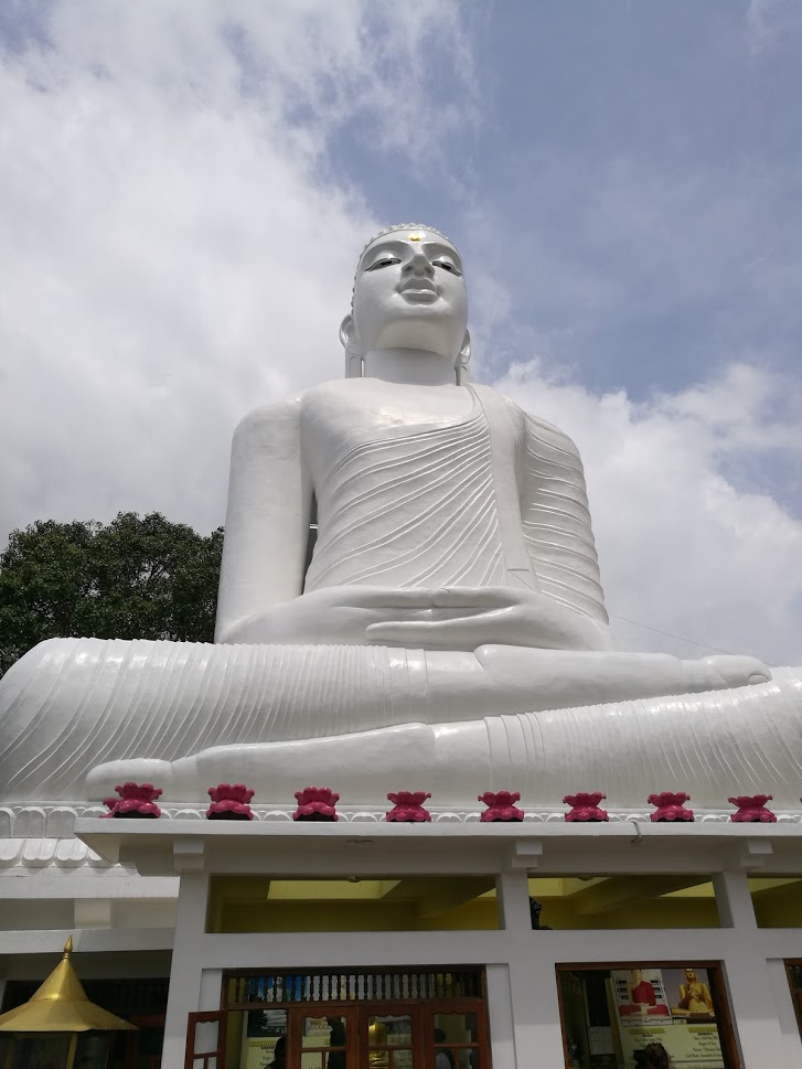 Kushan Liyanarachchi